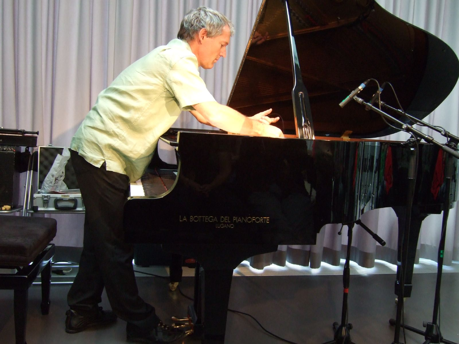 Pianist John Wolf Brennan (* 1954) mit präpariertem Klavier während des Jazz Festival Willisau 2010